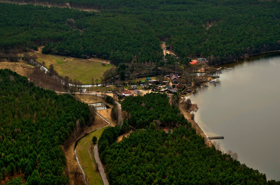 Borsk z lotu ptaka.